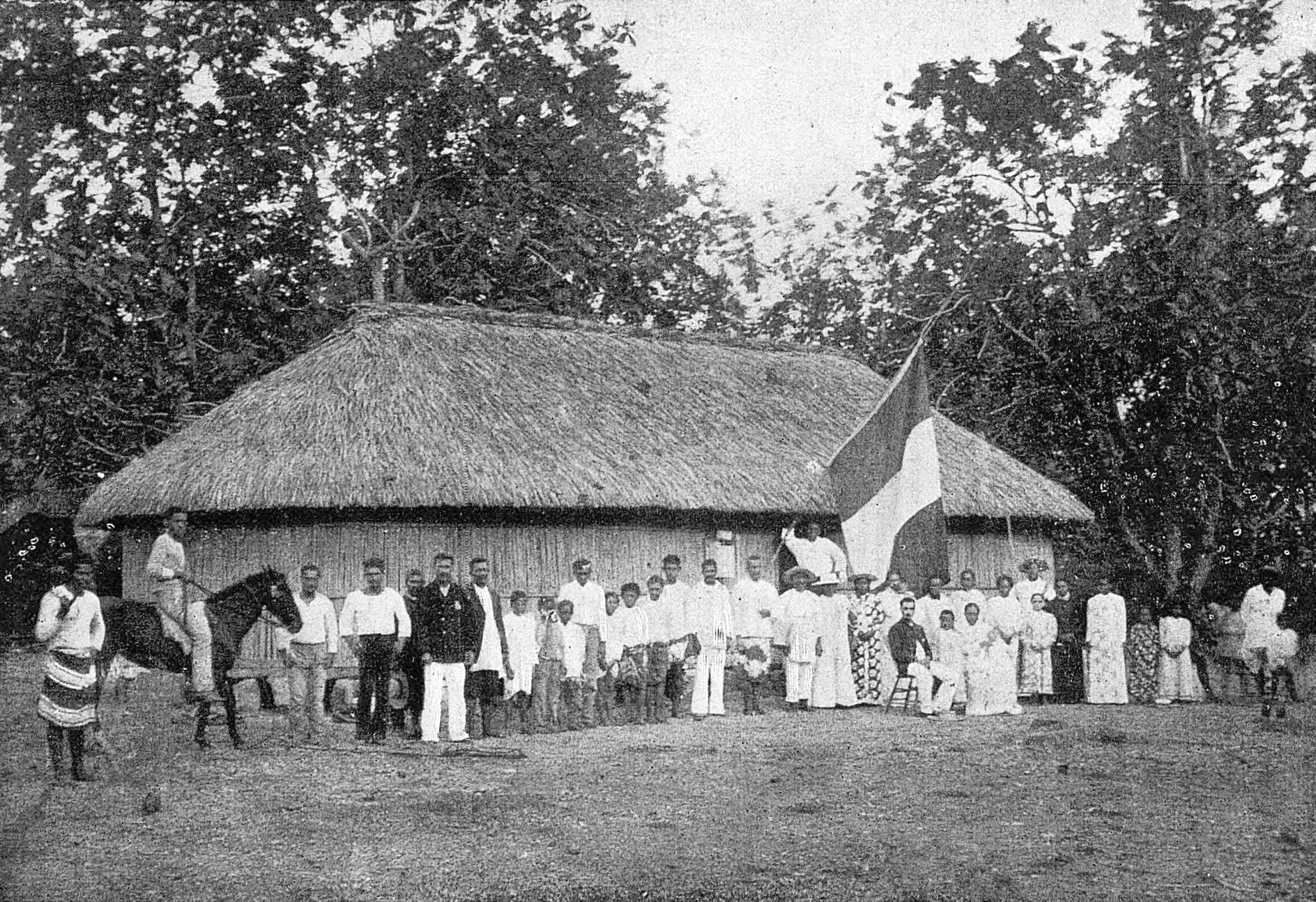 La chefferie d’Afareïtu à Mooréa.